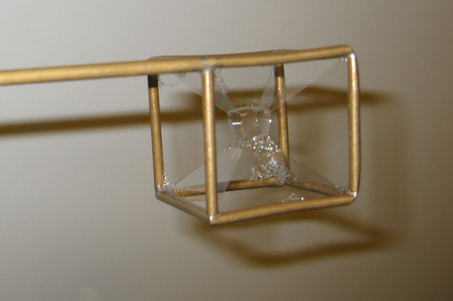 Površinska napetost milnica / Surface tension